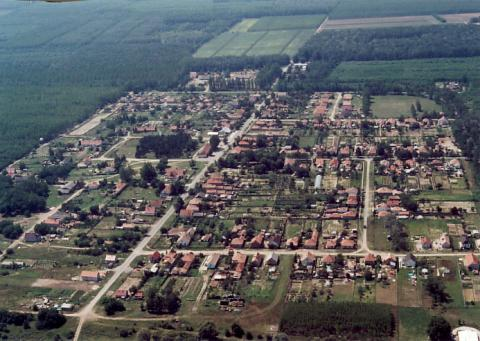 Mikebuda, Hungary, aerialphotography